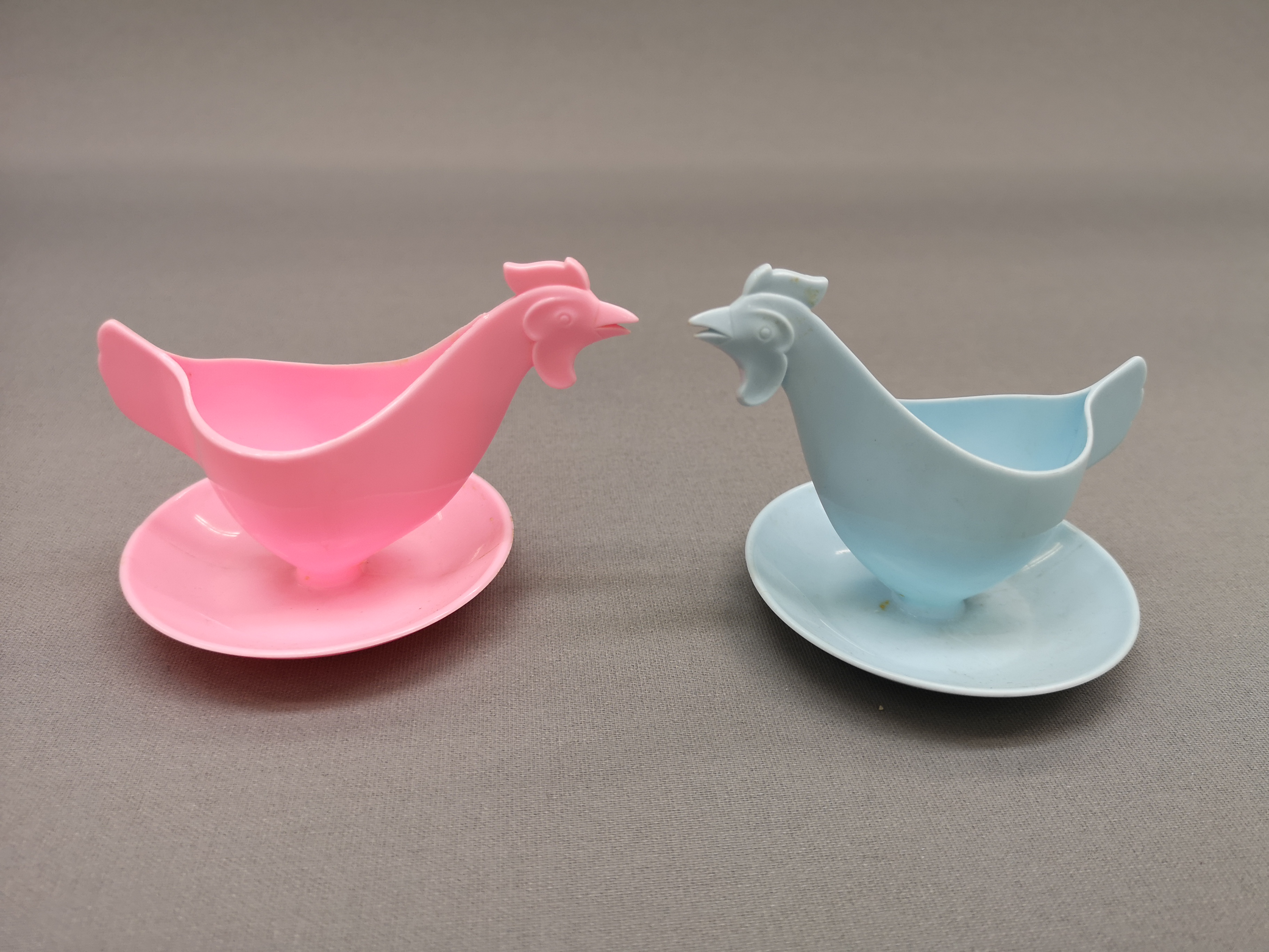 Eierbecher aus der Sammlung von Alltagsgegenständen der DDR im Museum Europäischer Kulturen